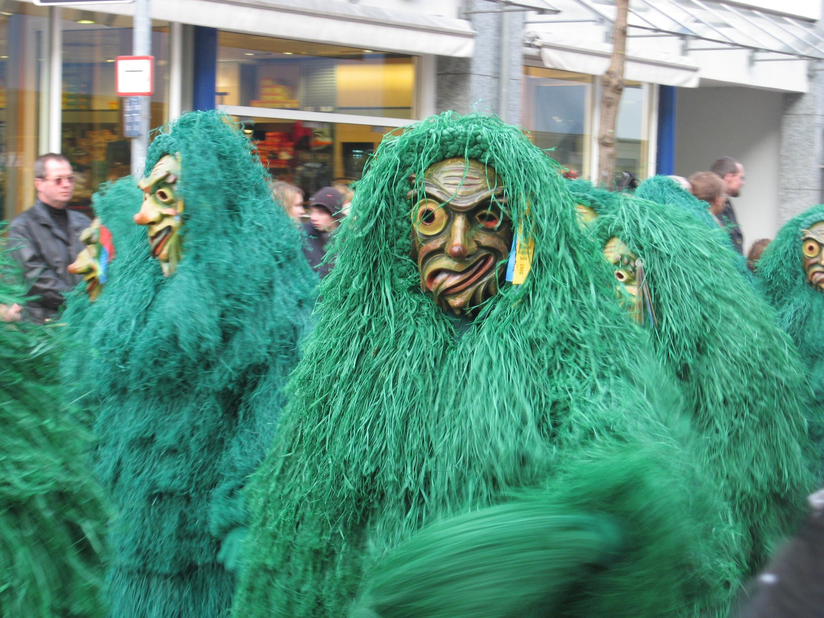 Seewaldkobolde auf dem Umzug in Friedrichshafen 2007